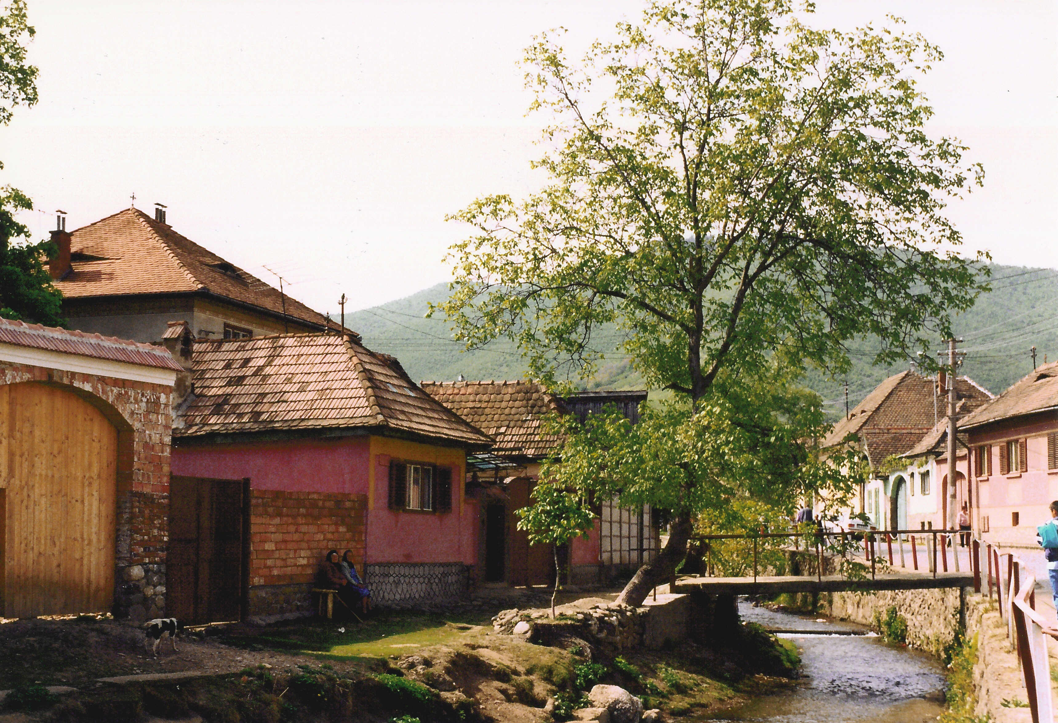 Răşinari, Sibiu County, Romania.